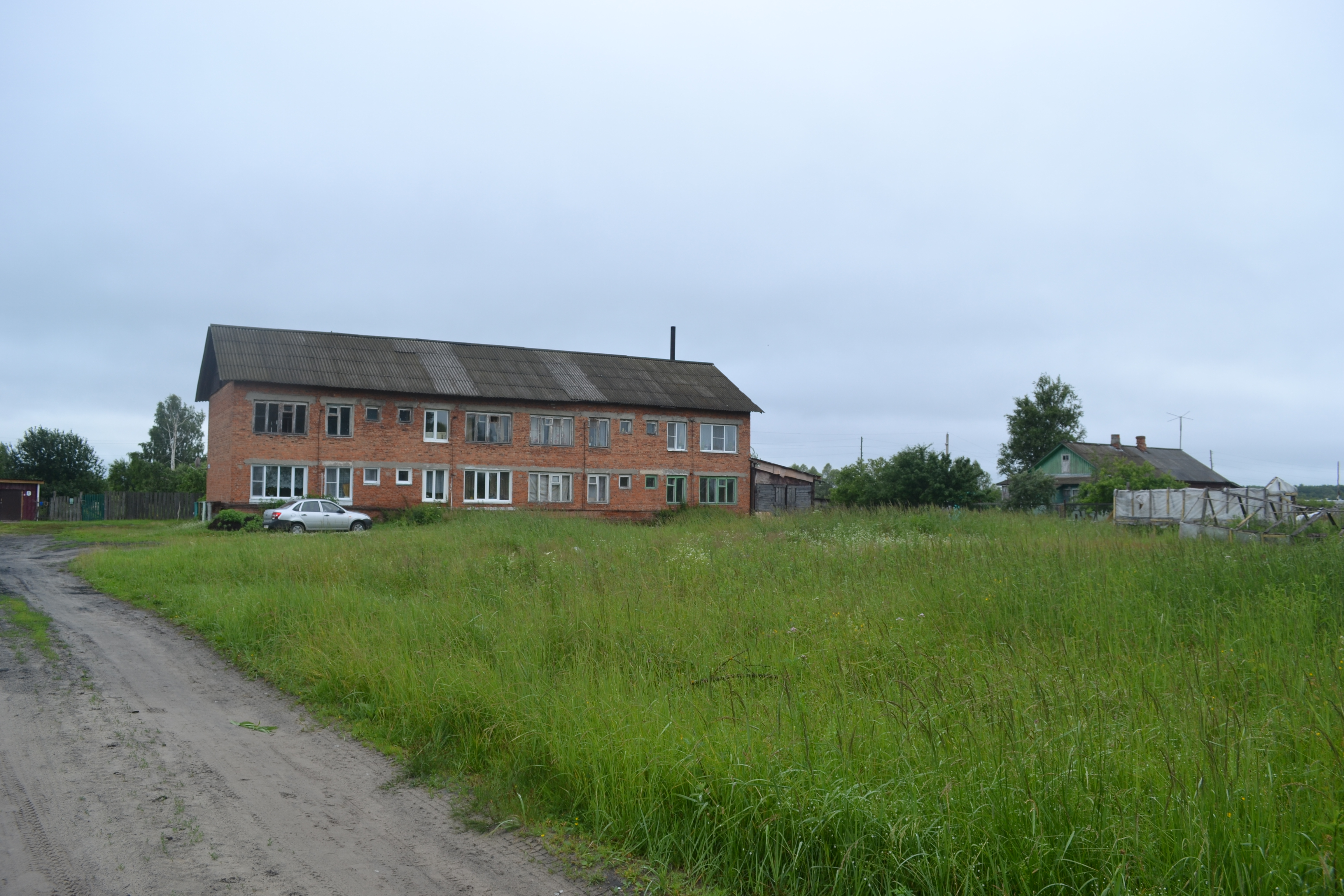 Маврино (Шатурский район)